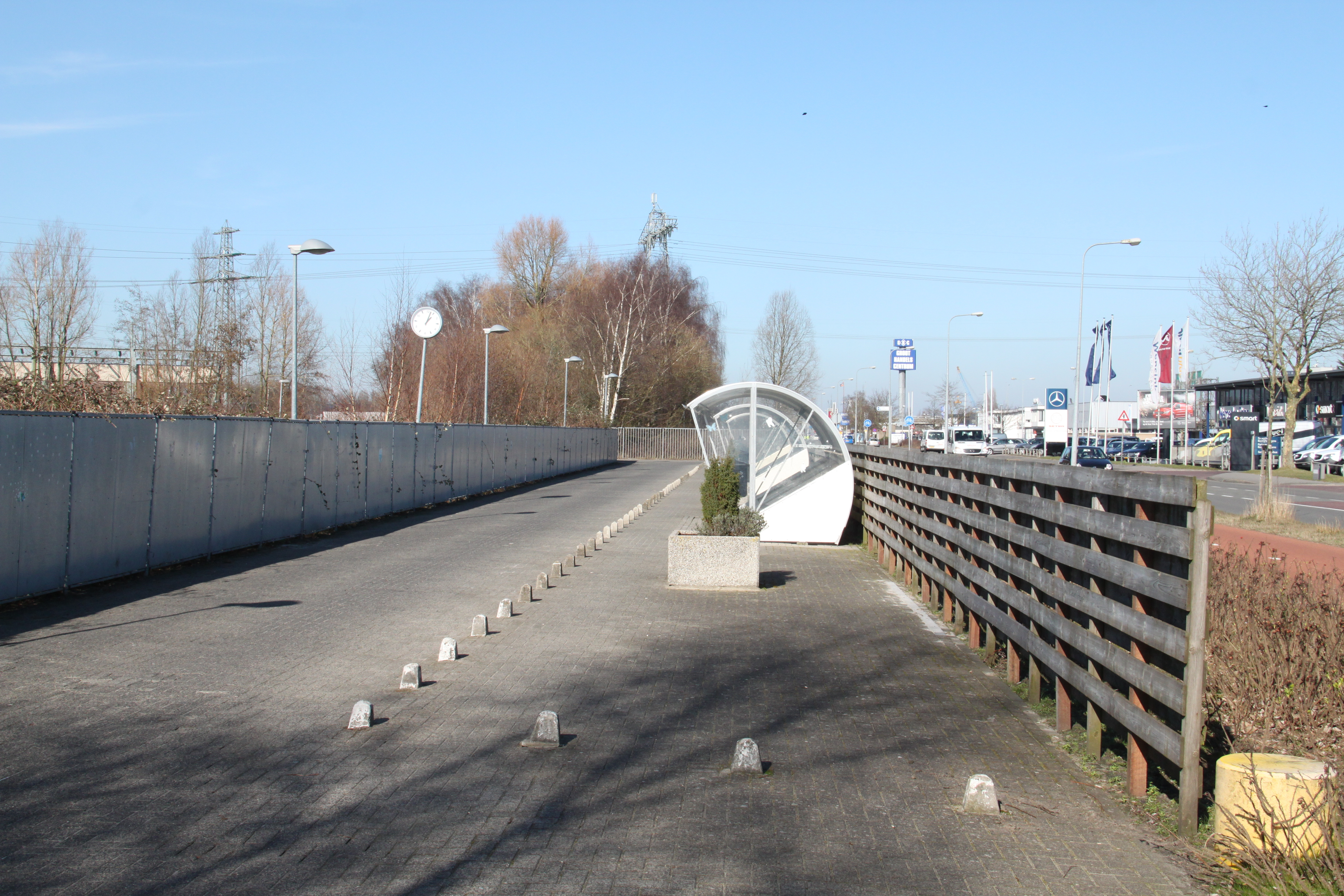 Zicht op de Groninger tippelzone aan de Bornholmstraat.